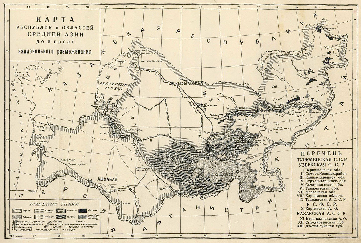 Карта республик и областей Средней Азии до и после национального размежевания из книги Рамзин, К. Революция в Средней Азии. М.: Издательство Саку, 1928. [12] с., 125 л. ил.; 270х350 мм. 5000 экз.